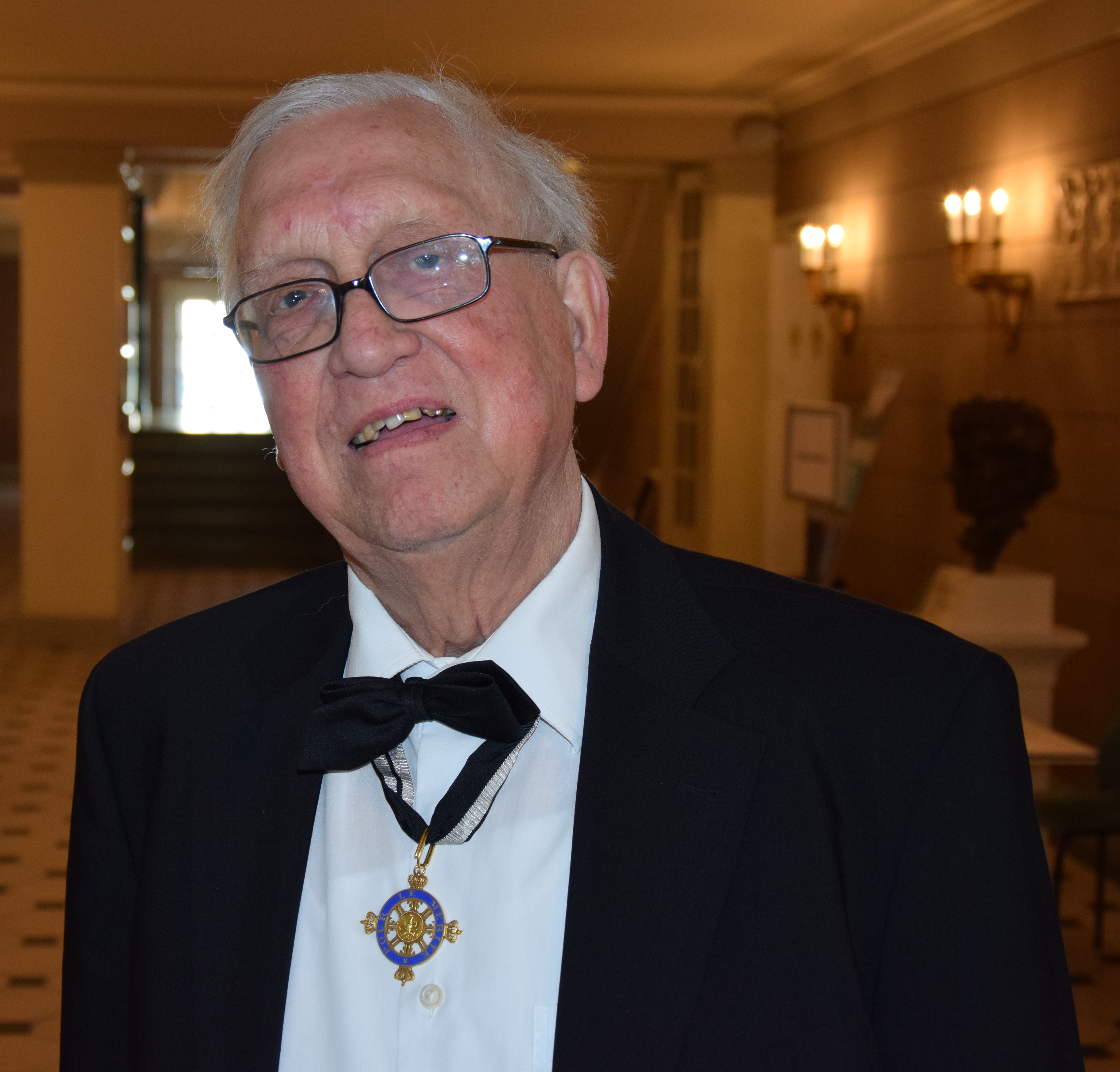 Öffentliche Sitzung der Mitglieder des Ordens Pour le mérite für Wissenschaften und Künste 2014 im Konzerthaus am Gendarmenmarkt in Berlin